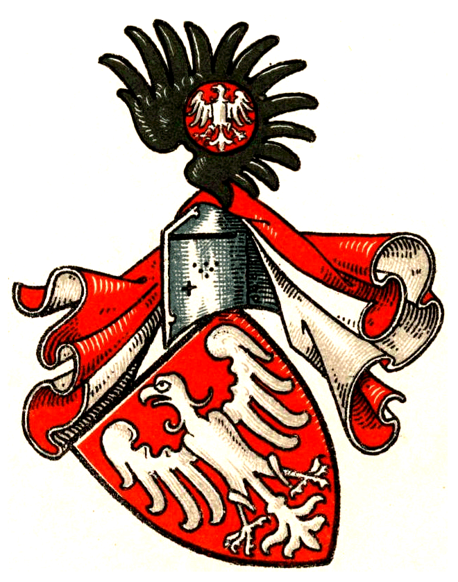 Wappen der Grafen von Arnsberg